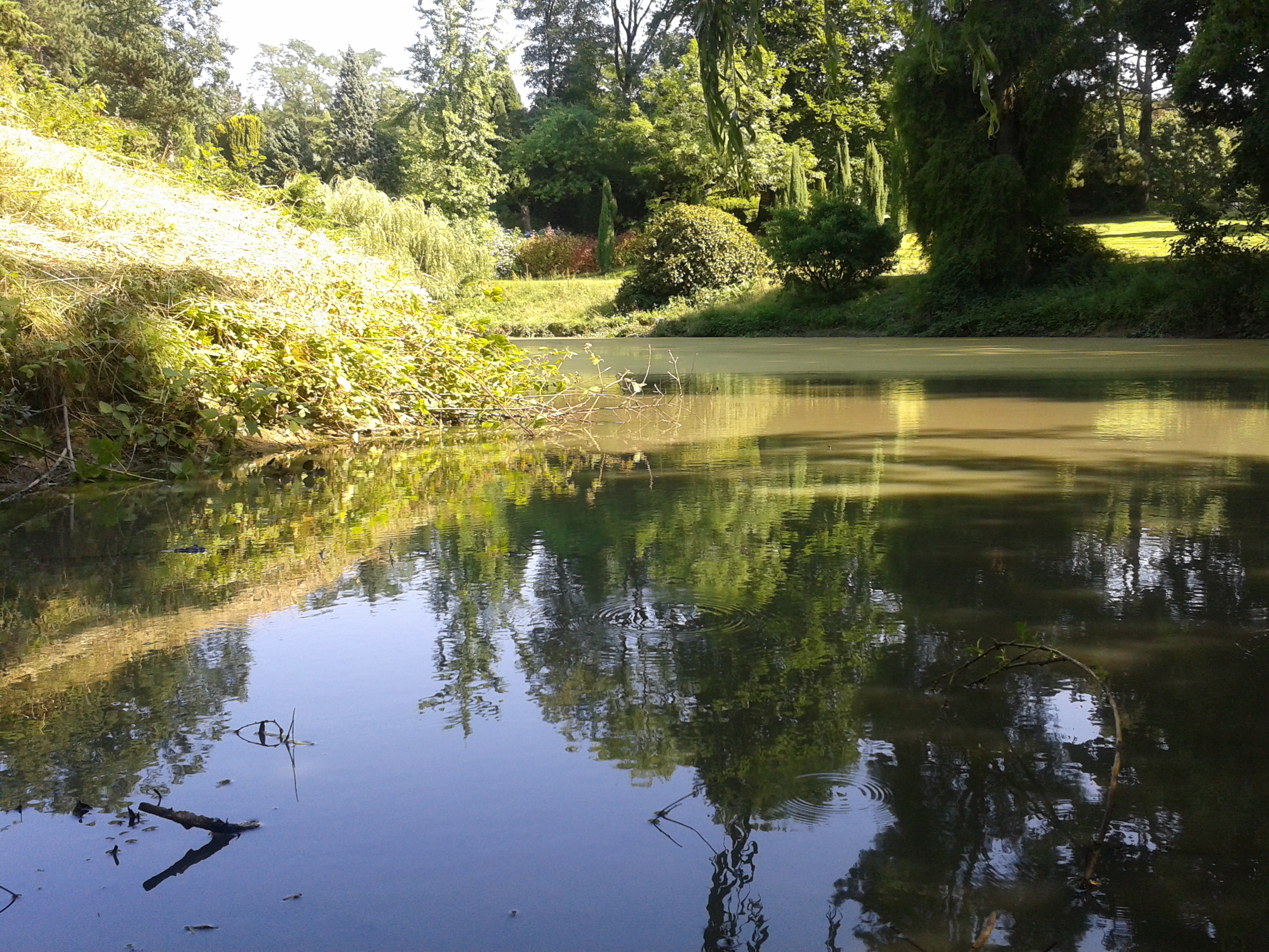 Parc arboretum du manoir aux loups, Halluin, classé jardin remarquable